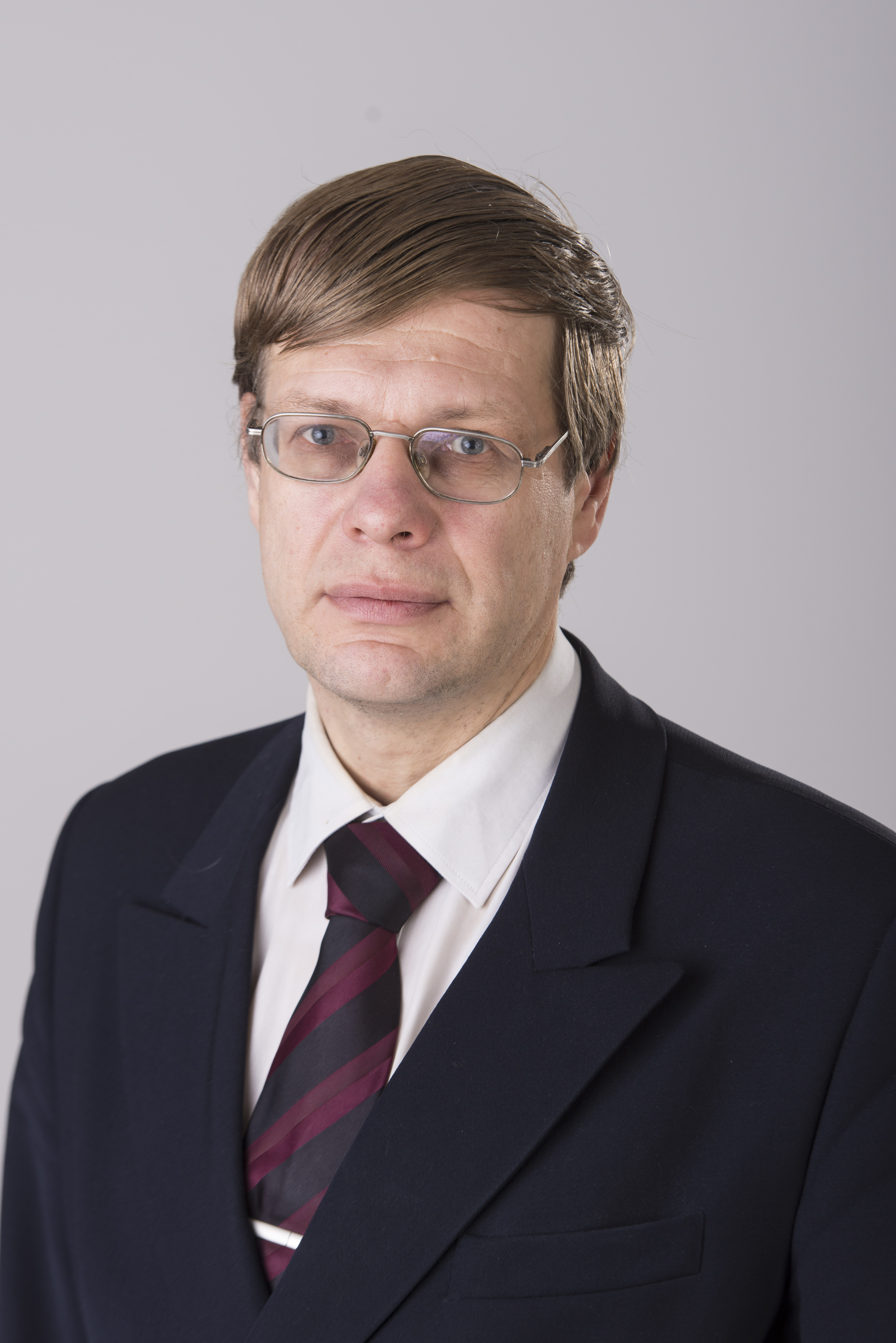 2014.gada 9.decembris. 12.Saeimas deputāts Einārs Cilinskis. Foto: Reinis Inkēns, Saeimas Kanceleja Izmantošanas noteikumi: saeima.lv/lv/autortiesibas